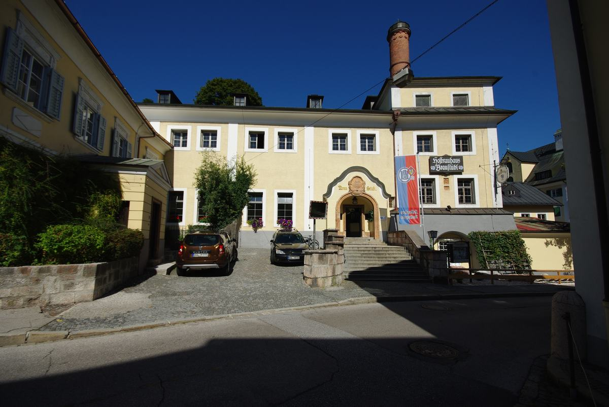 Bräuhausstr. 13, 83471 Berchtesgaden, Hofbräuhaus BerchtesgadenThis is a photograph of an architectural monument.